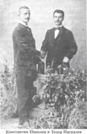 Константин Николов и Тодор Паскалев.